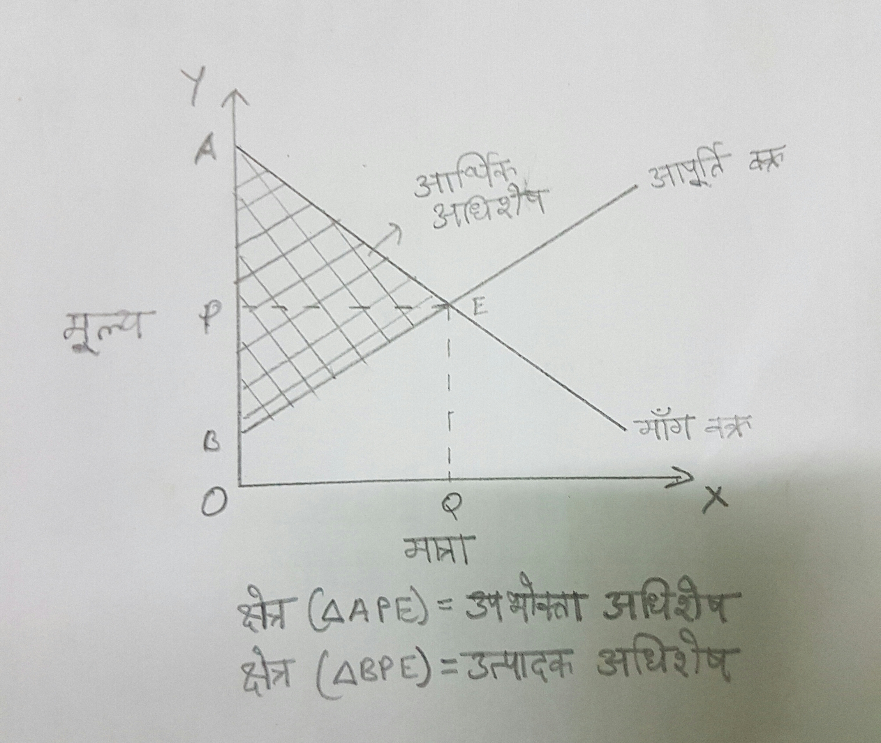 मांग और आपूर्ति वक्रो द्वारा आर्थिक अधिशेष का प्रतिनिधित्व